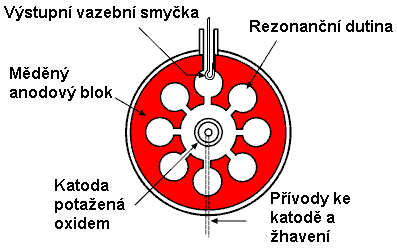 Schematický nákres vnitřní konstrukce magnetronu.